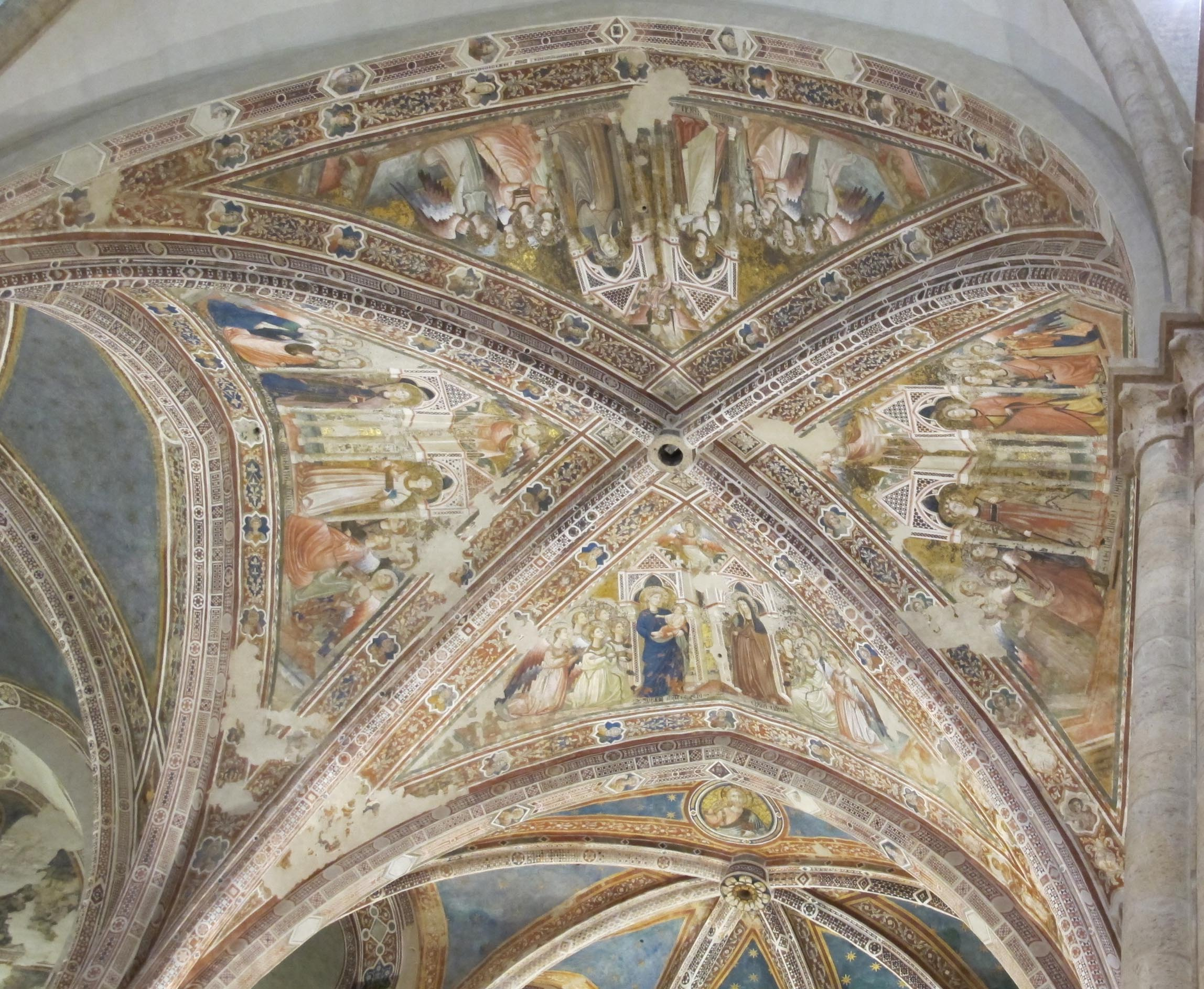 Assisi, santa chiara, interno, maestro espressionista di santa Chiara, volta con sante